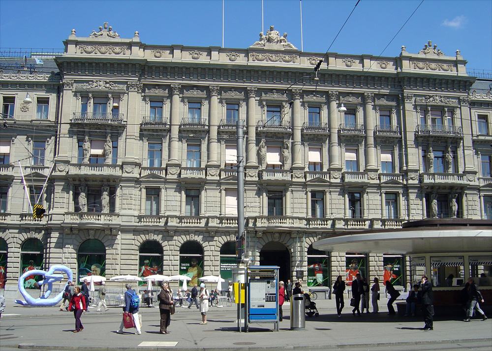 Der Hauptsitz der Credit Suisse am Paradeplatz in Zürich